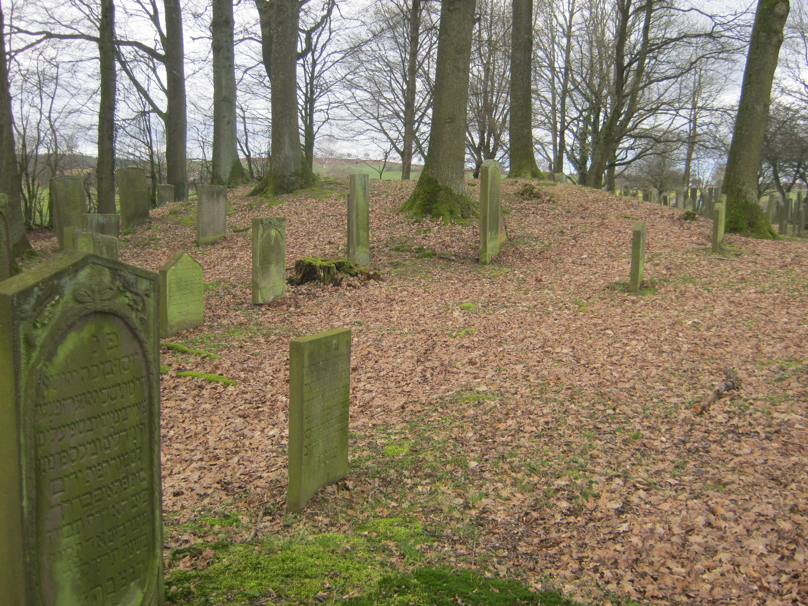 Jüdischer Friedhof Weyhers